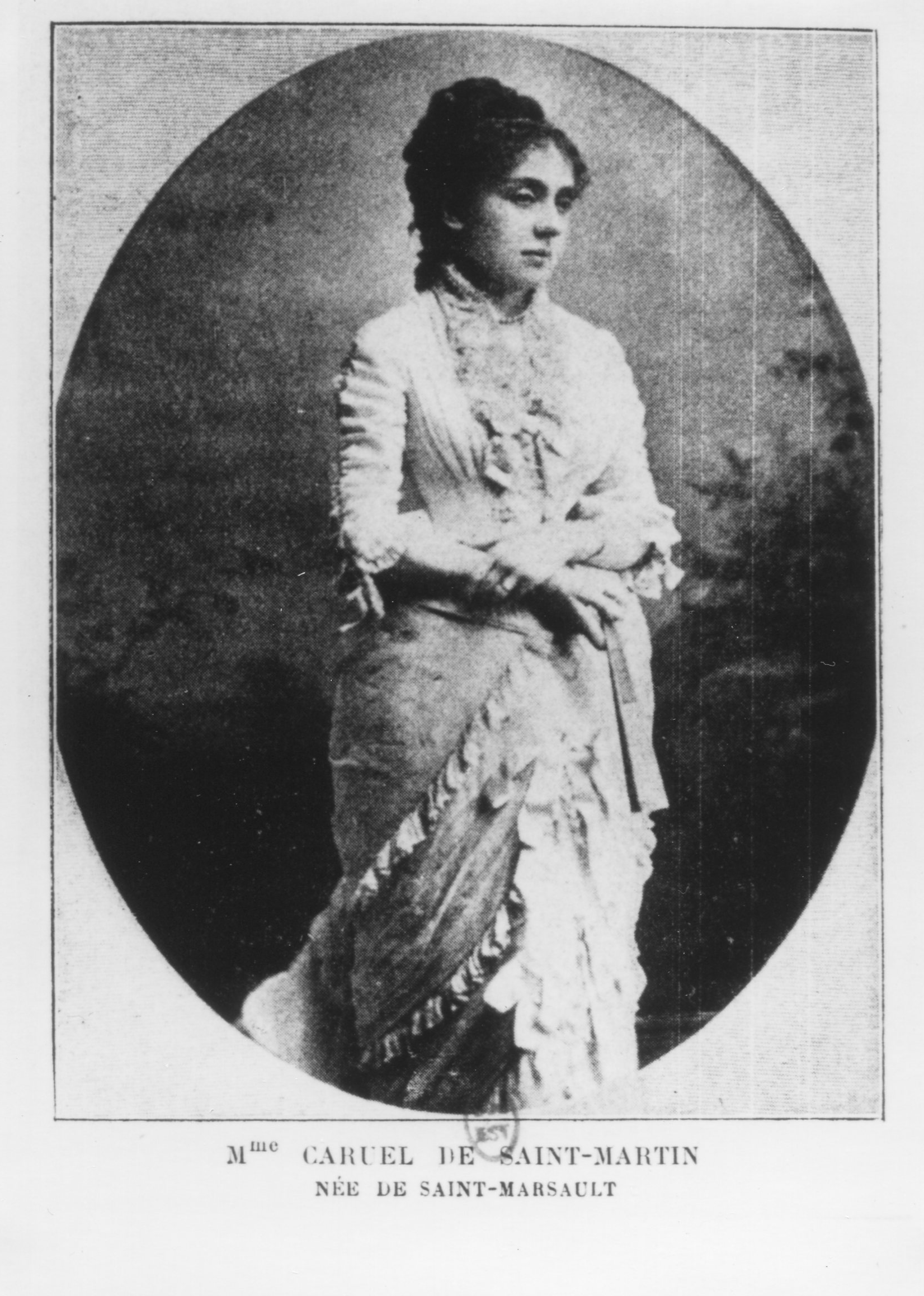 Elisabeth CSM